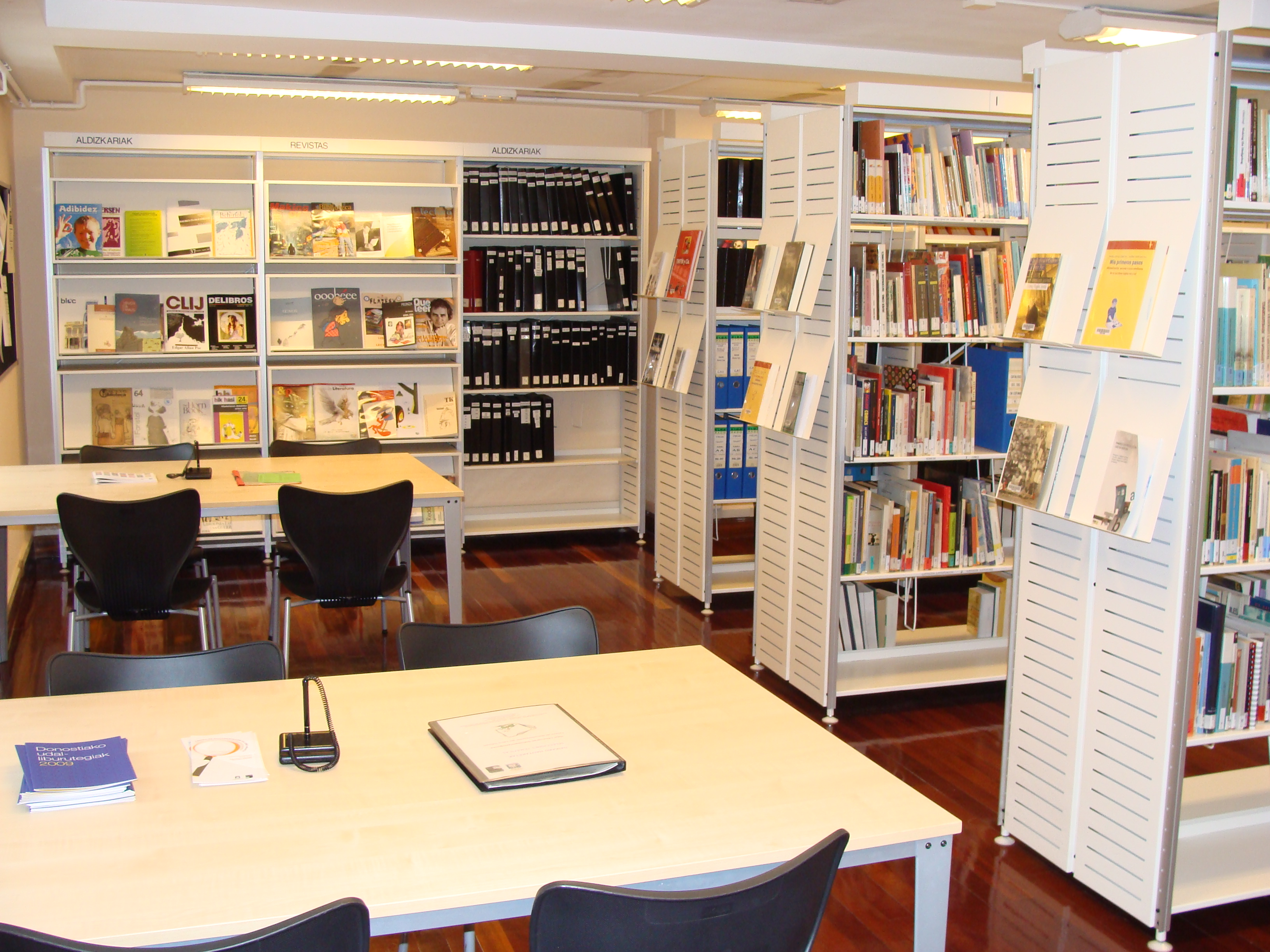 Haur Liburuaren Dokumentaziogunea